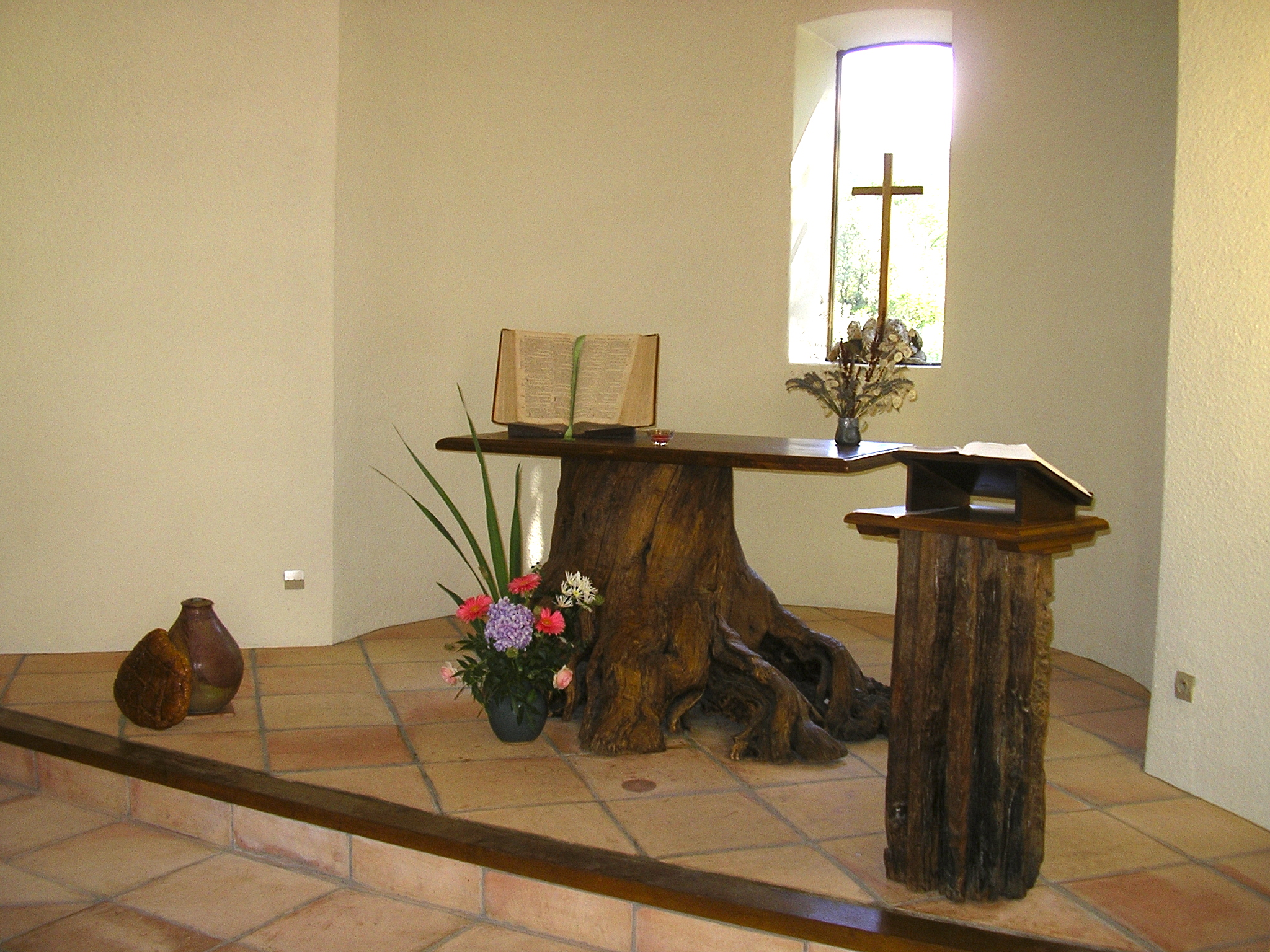 Intérieur de la chapelle du mas des Abeillères, près de Saint-Jean-du-Gard, France.